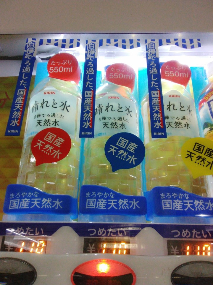 都営地下鉄春日駅で自分で撮影。